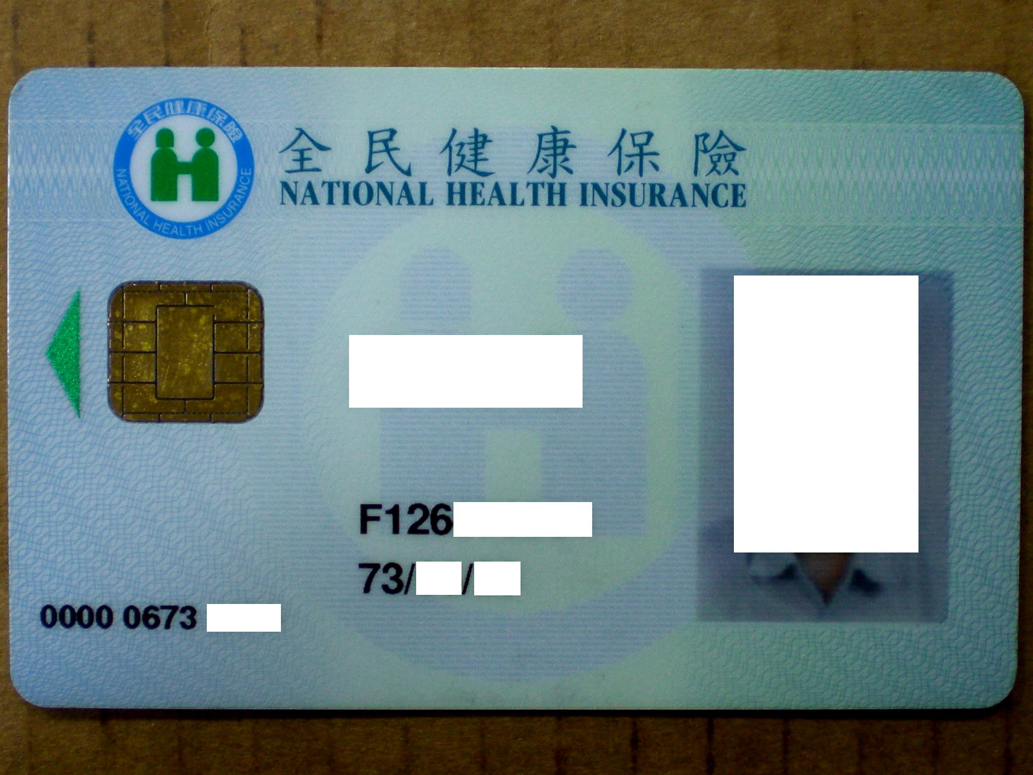 中華民國全民健康保險IC卡正面